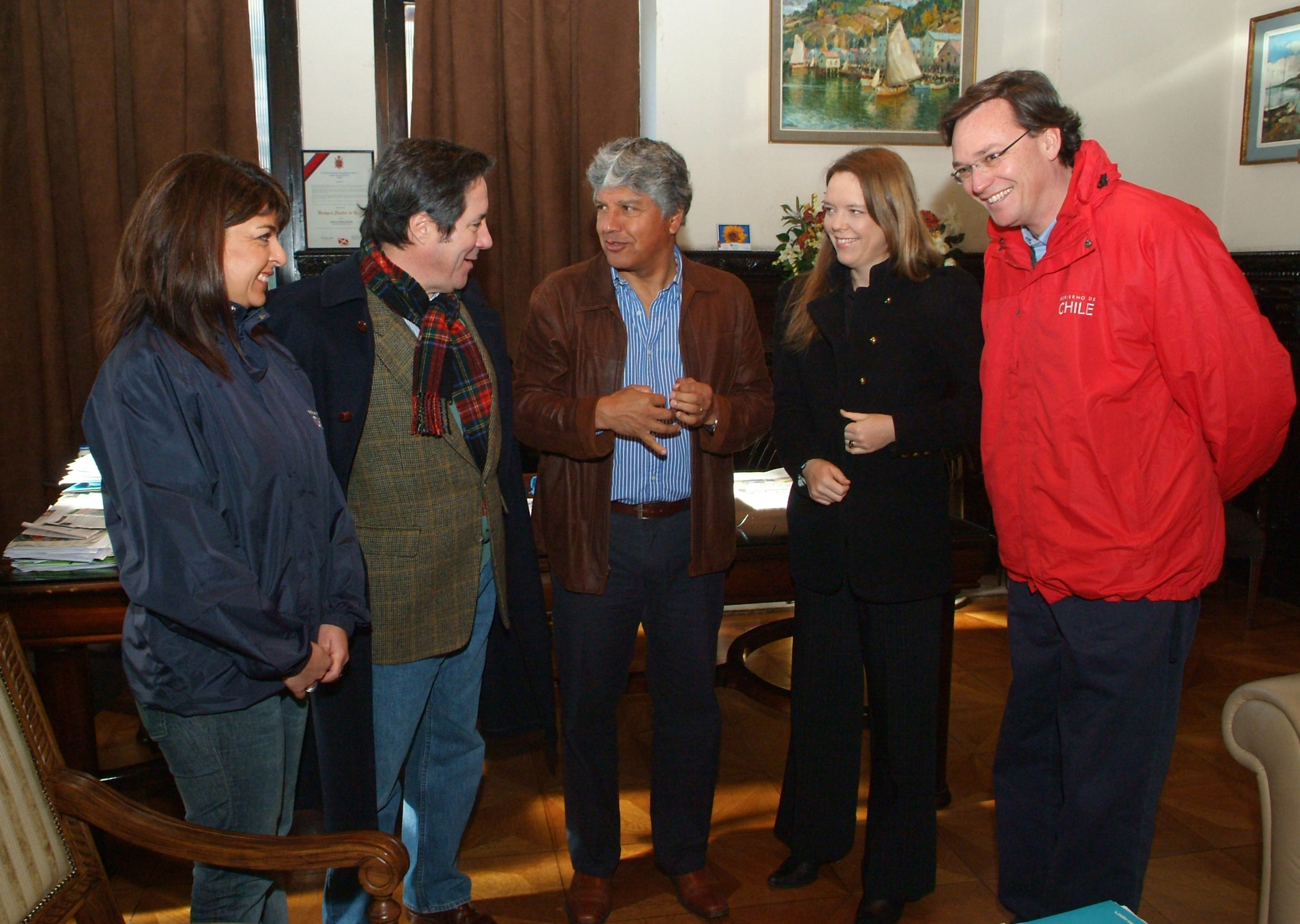 La Ministra Secretaria General de Gobierno, Ena Von Baer, el Ministro de Minería (s), Pablo Wagner, la SEREMI, María Angélica Silva, el Alcalde de Valparaíso, Jorge Castro, y parlamentarios, realizan visita a las familias del Cerro Merced. Valparaíso